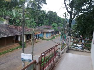 Pottankad